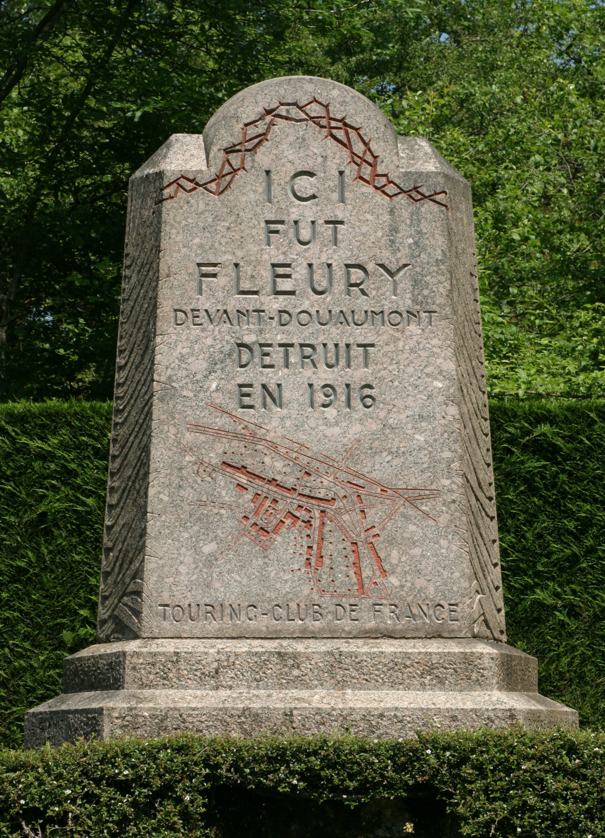 Fleury devant Douaumont - Détruit en 1916